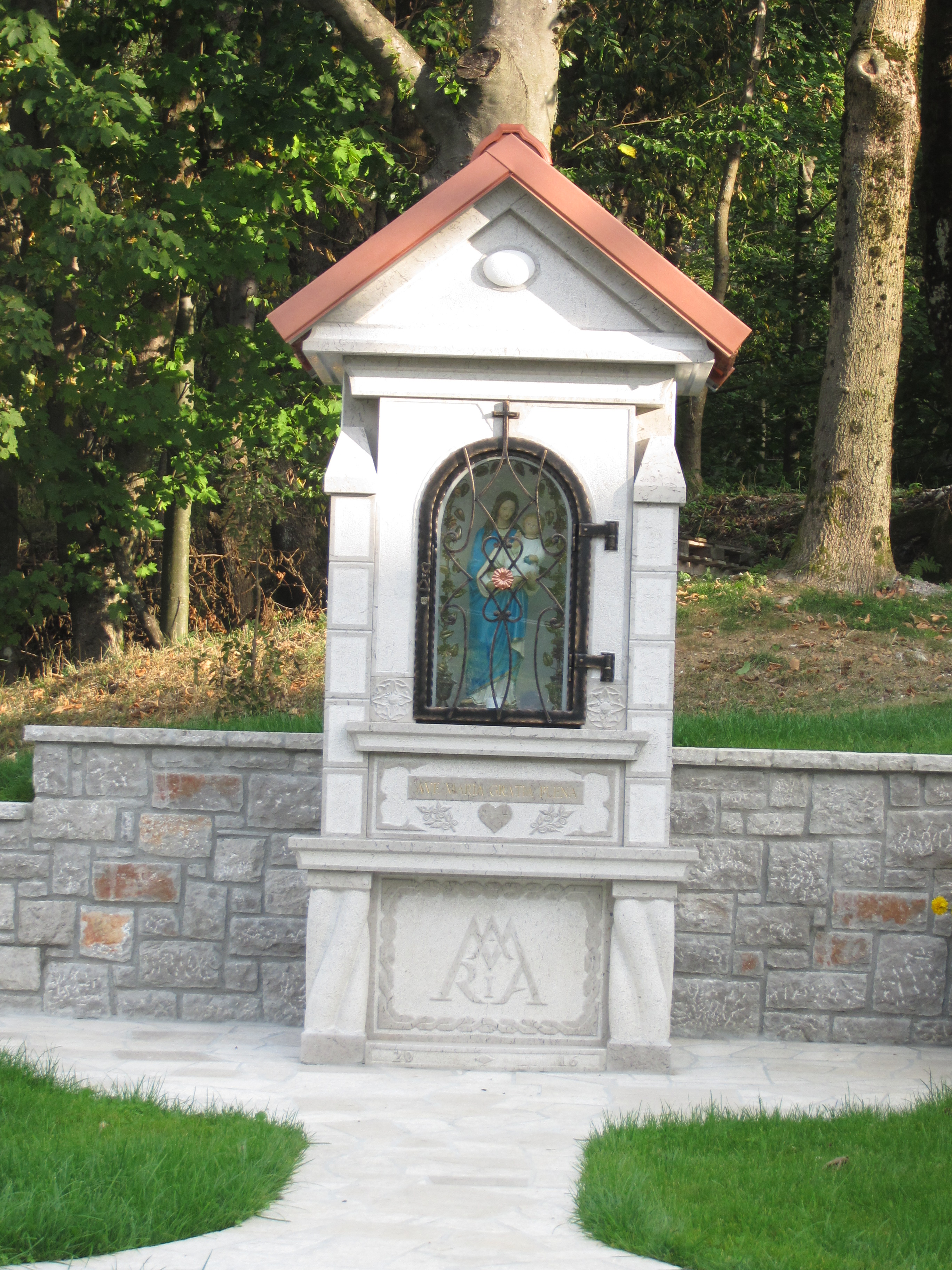 Kapela Marije, Matere usmiljenja